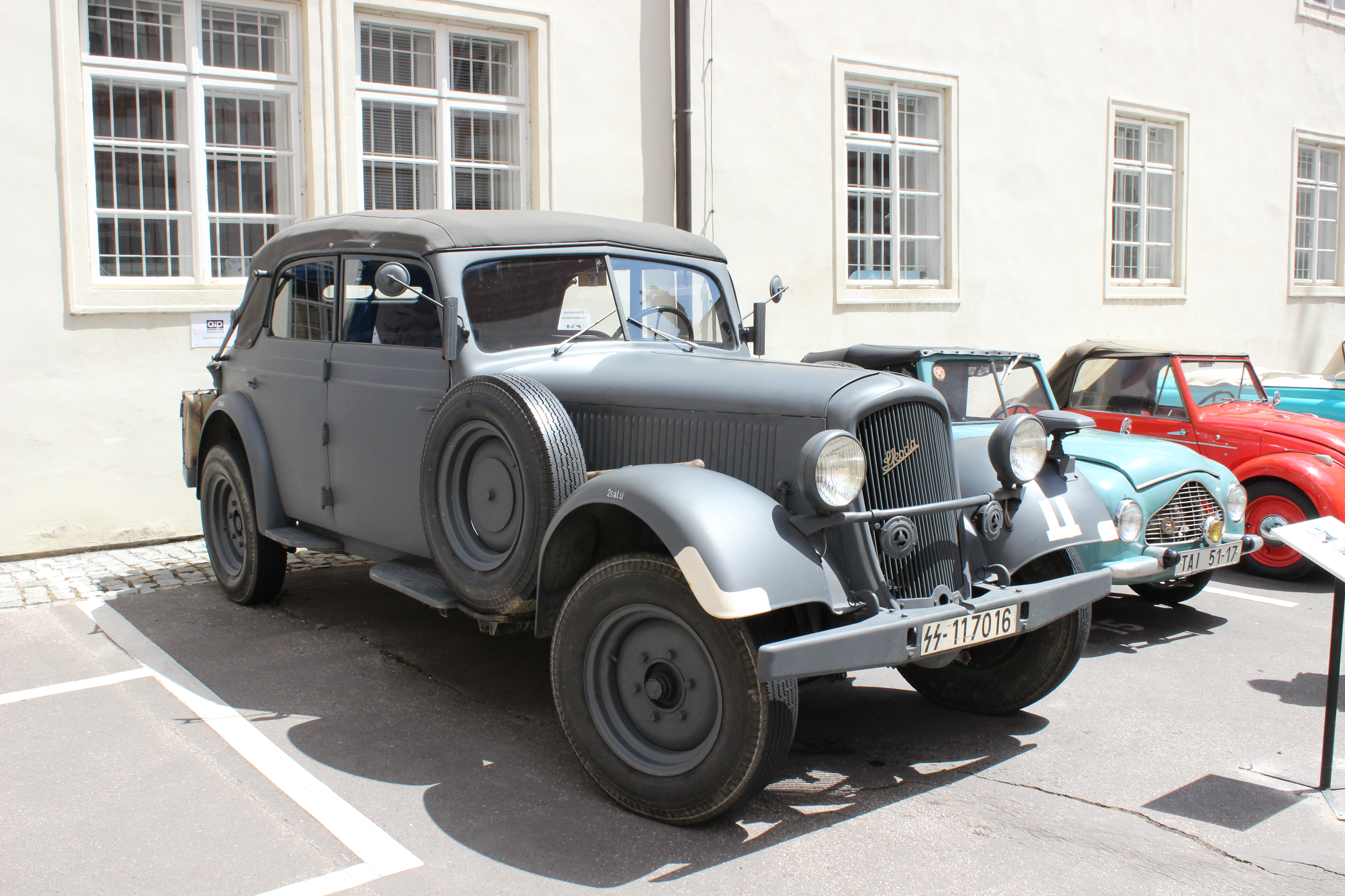 Objekty vystavené na výstavě „Český kabriolet a kupé v průběhu století“ uspořádané v areálu Fakulty dopravní Českého vysokého učení technického v Praze.